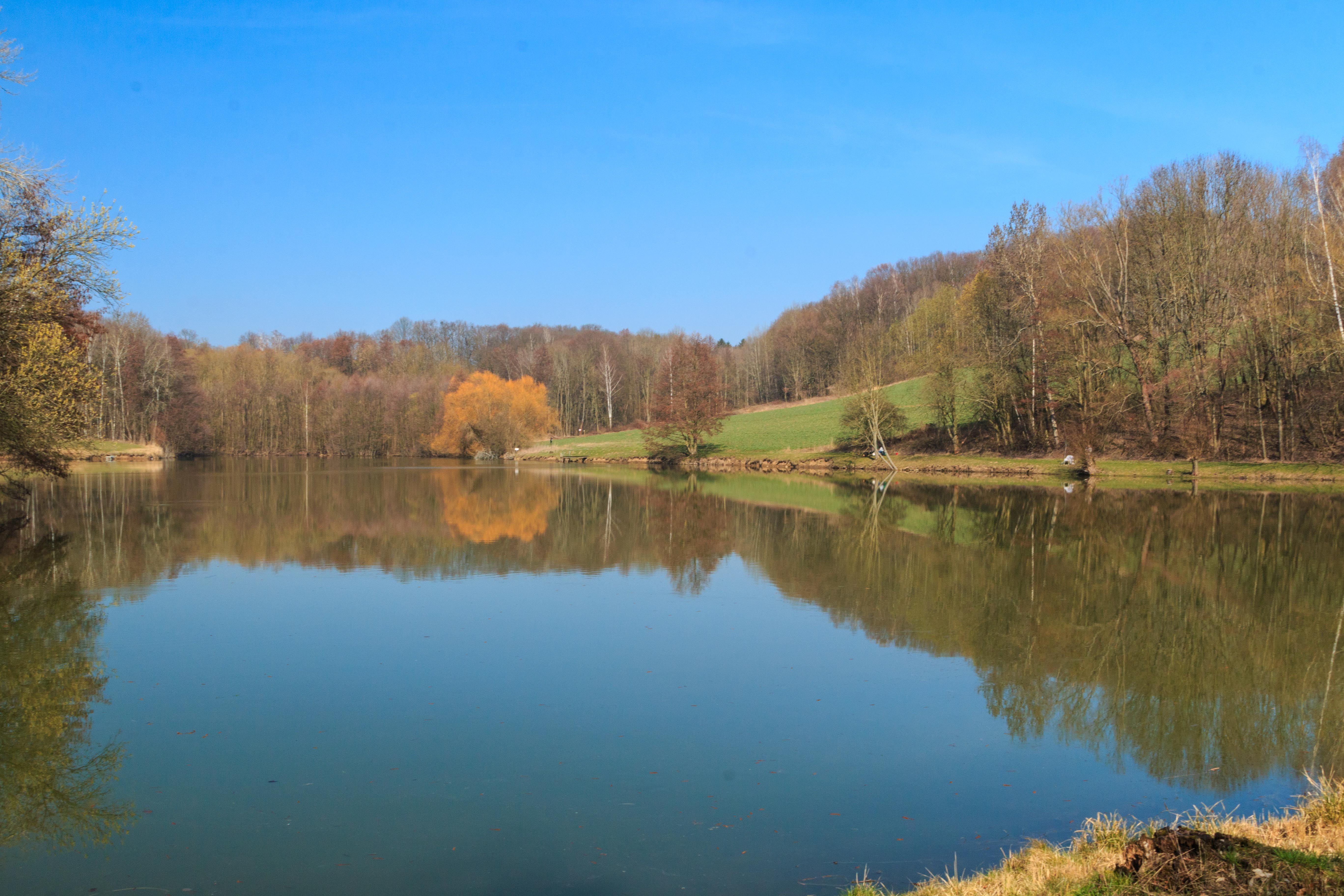 rybník Ryba u Zelenecké Lhoty